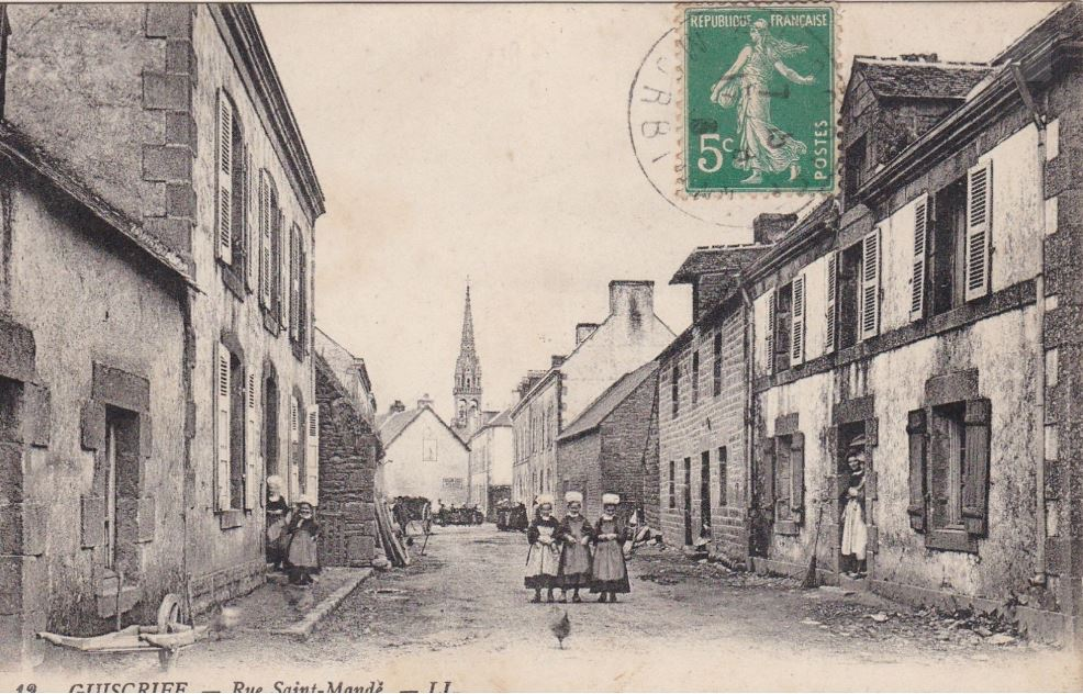 la rue Saint Maudé située dans le bourg de Guiscriff au début du XXe siécle (carte postale ancienne)